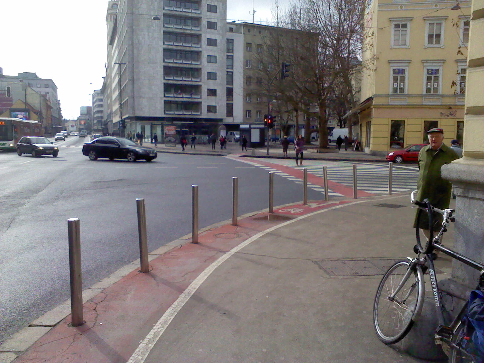 Slovenska cesta v Ljubljani, križišče z Gosposvetsko cesto: kolesarska steza